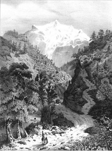 Gorge de Sonnant, chemin d'Uriage